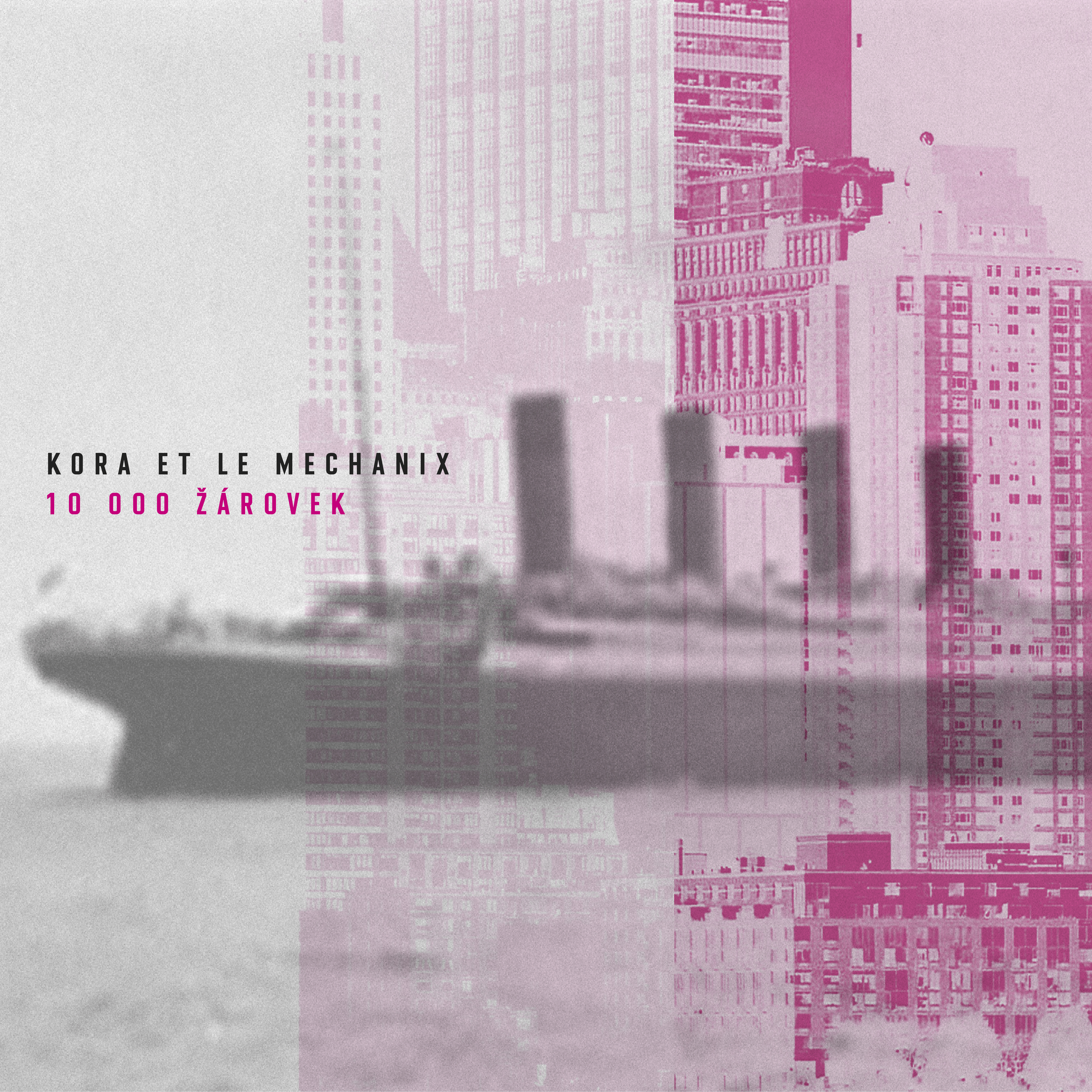 Kora et le Mechanix 10000 žárovek